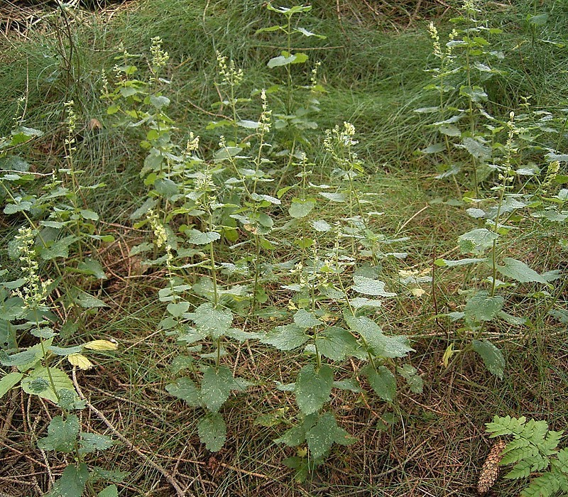 Teucrium scorodonia